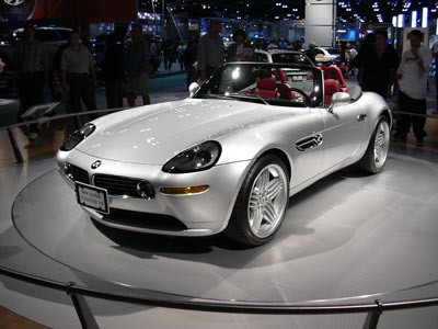 BMW Z8 Alpina, Los Angeles Auto Show 2003